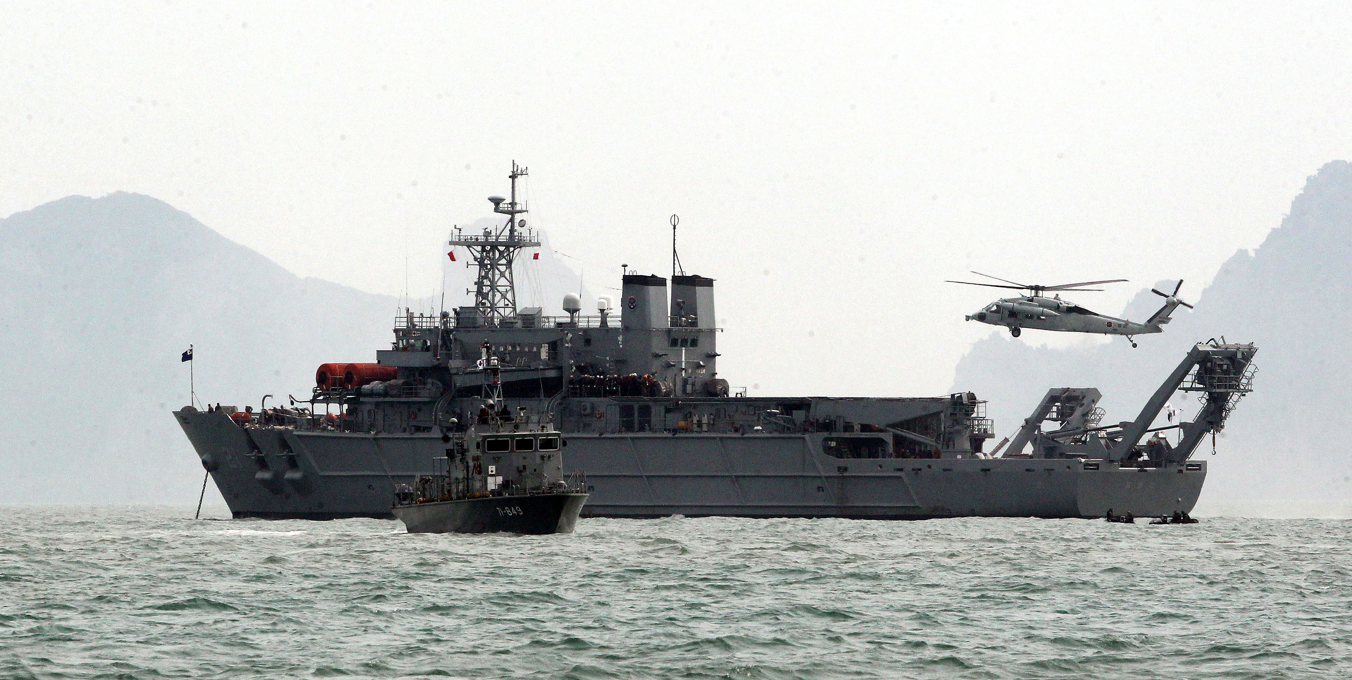 해군 함정과 헬기가 22일 세월호 침몰사고 현장에서 탐색구조작전을 펼치고 있다. 촬영 - 김태형 기자